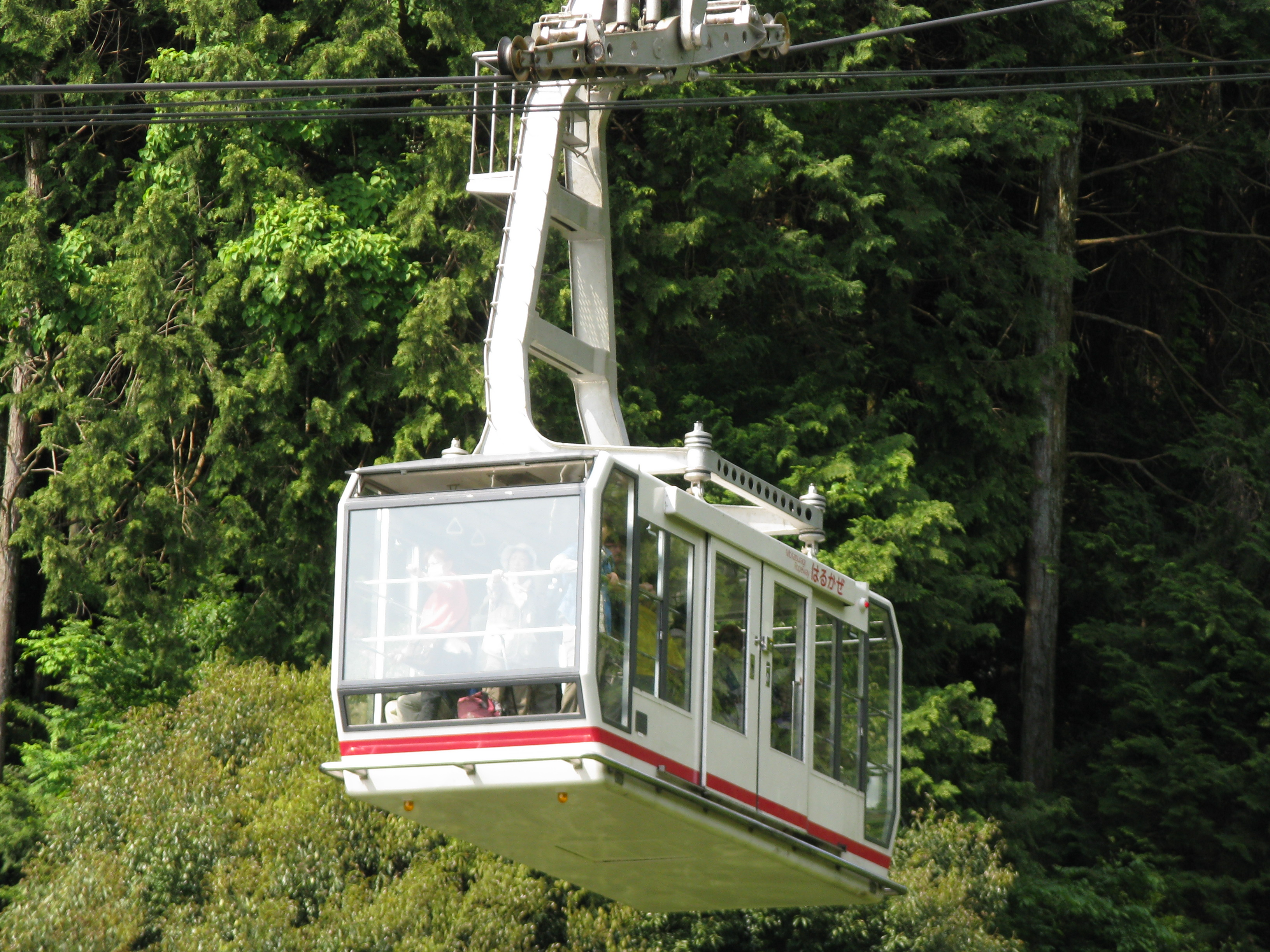 近鉄葛城索道線